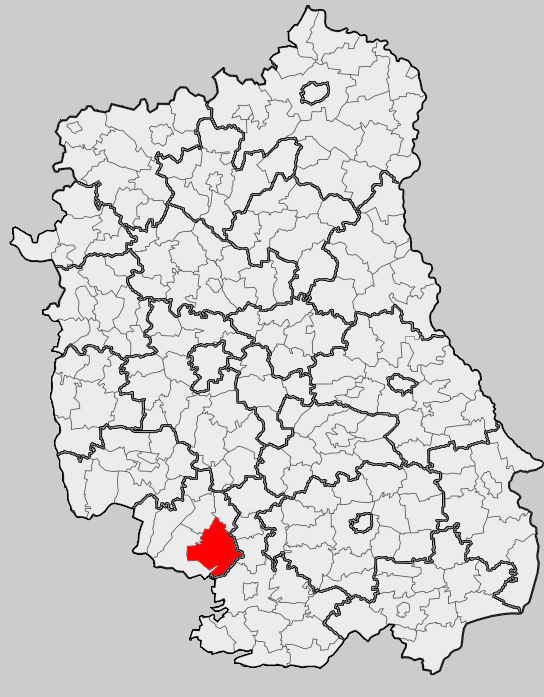 Map of gmina Dzwola, Janów Lubelski county, Lublin voivodship Mapa gminy Dzwola, powiat janowski, województwo lubelskie